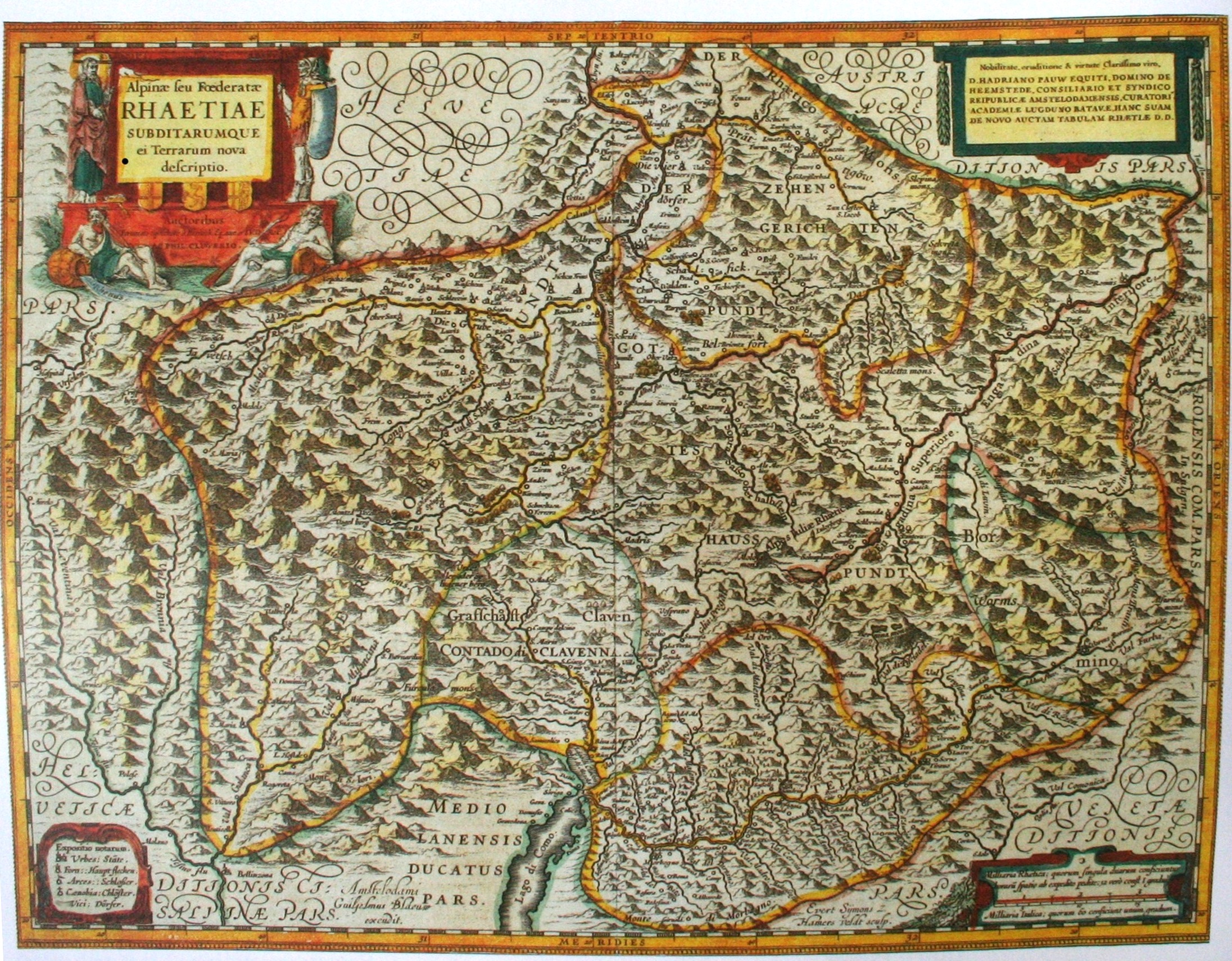 Alpine seu foederatae Rheatiae subditarumque ei terrarum nova descriptia (neue Beschreibung des alpinen oder bündnerischen Rätien und seinen Untertanengbiete); Karte von Fortunat Sprecher und Philipp Clüver der Drei Bünde und deren Untertanengebiete von 1618; die bekannteste und genauste Bündner Karte der frühen Neuzeit.